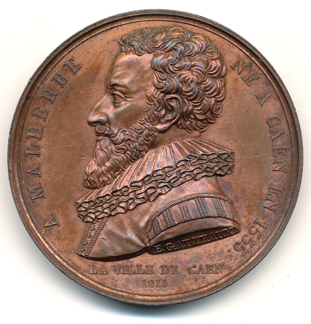 Portrait de Malherbe sur une médaille, par Gatteaux, pour la ville de Caen, 1815, cuivre 41mm